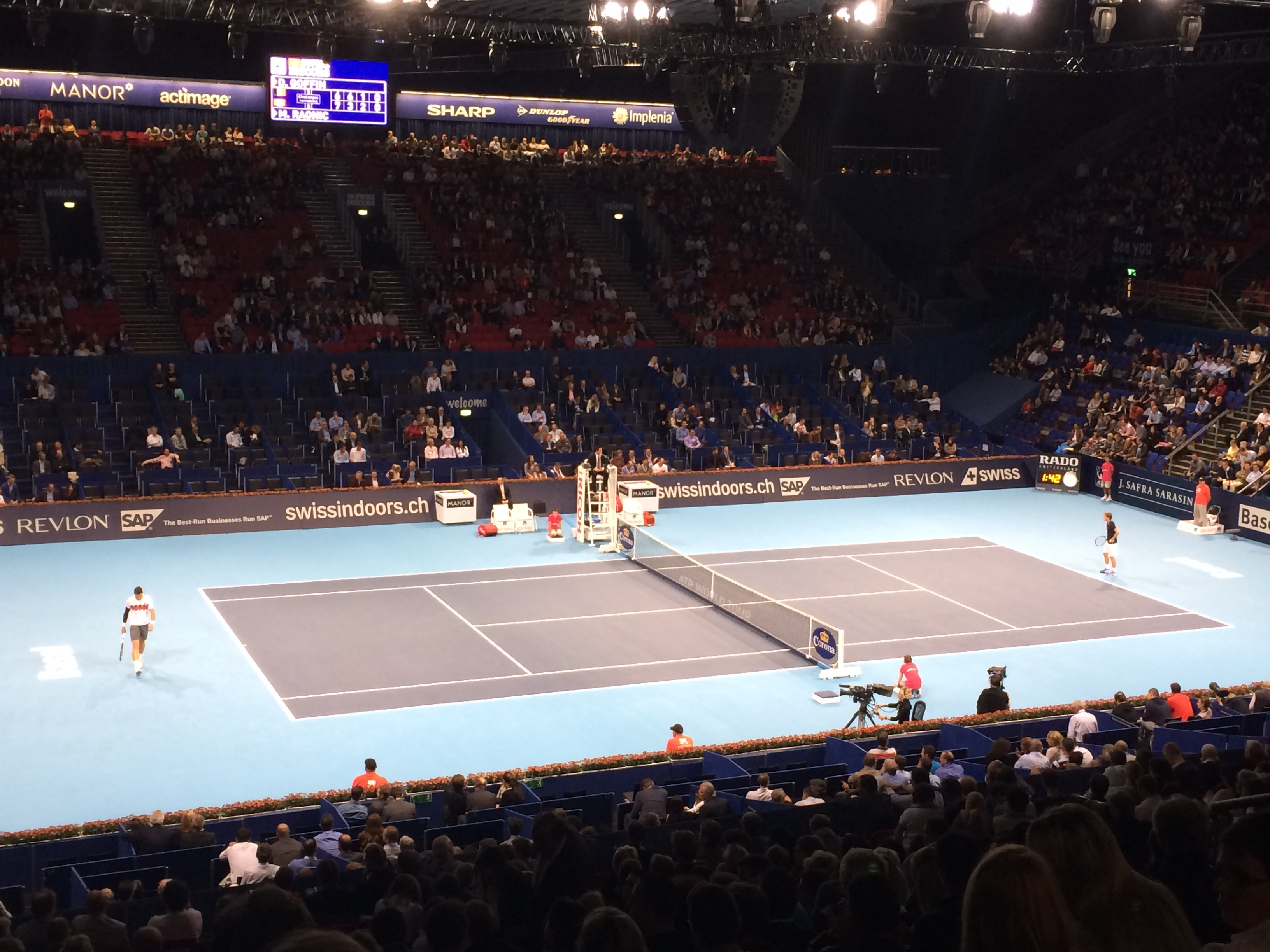 David Goffin und Milos Raonic in der Viertelfinalbegegnung der Swiss Indoors Basel 2014